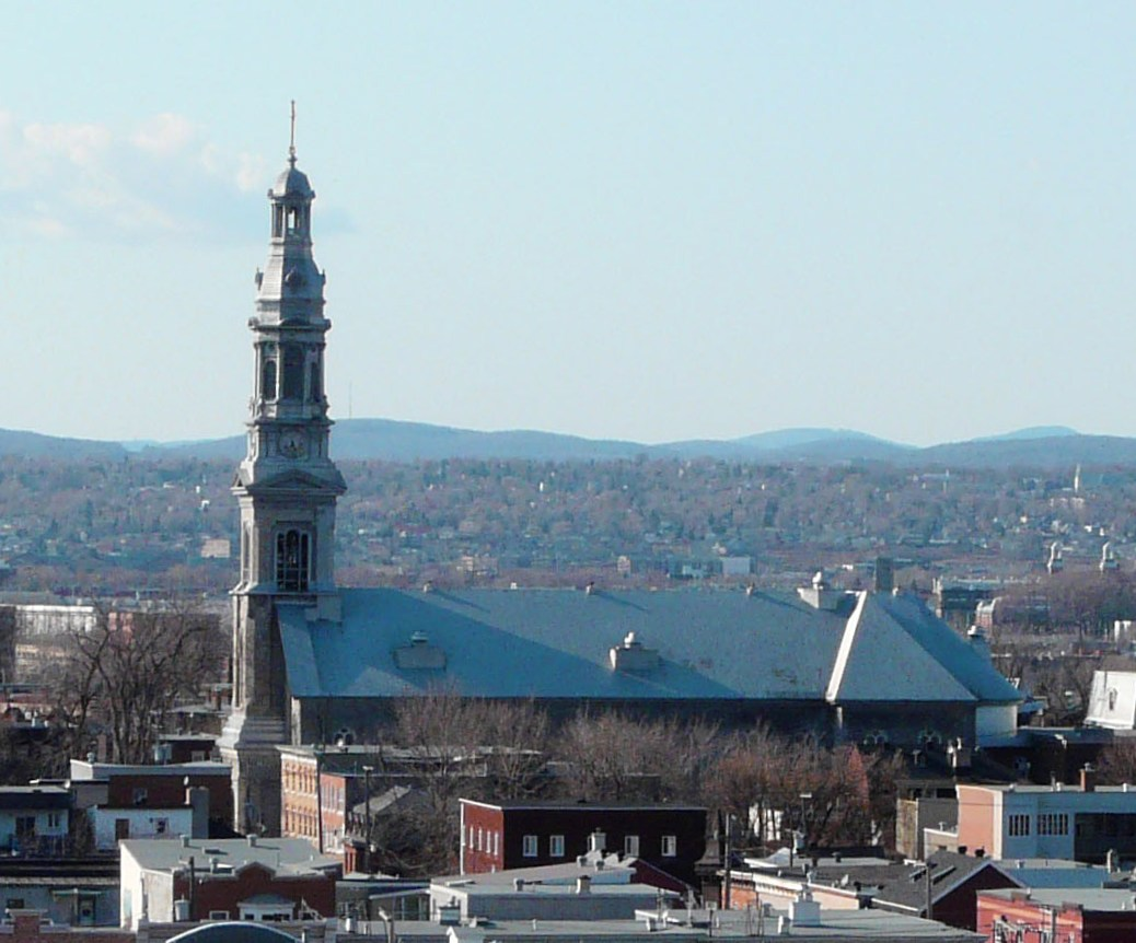 Église Saint-Sauveur, Quartier de Saint-Sauveur, arrondissement La Cité-Limoilou, ville de Québec (Québec), Canada